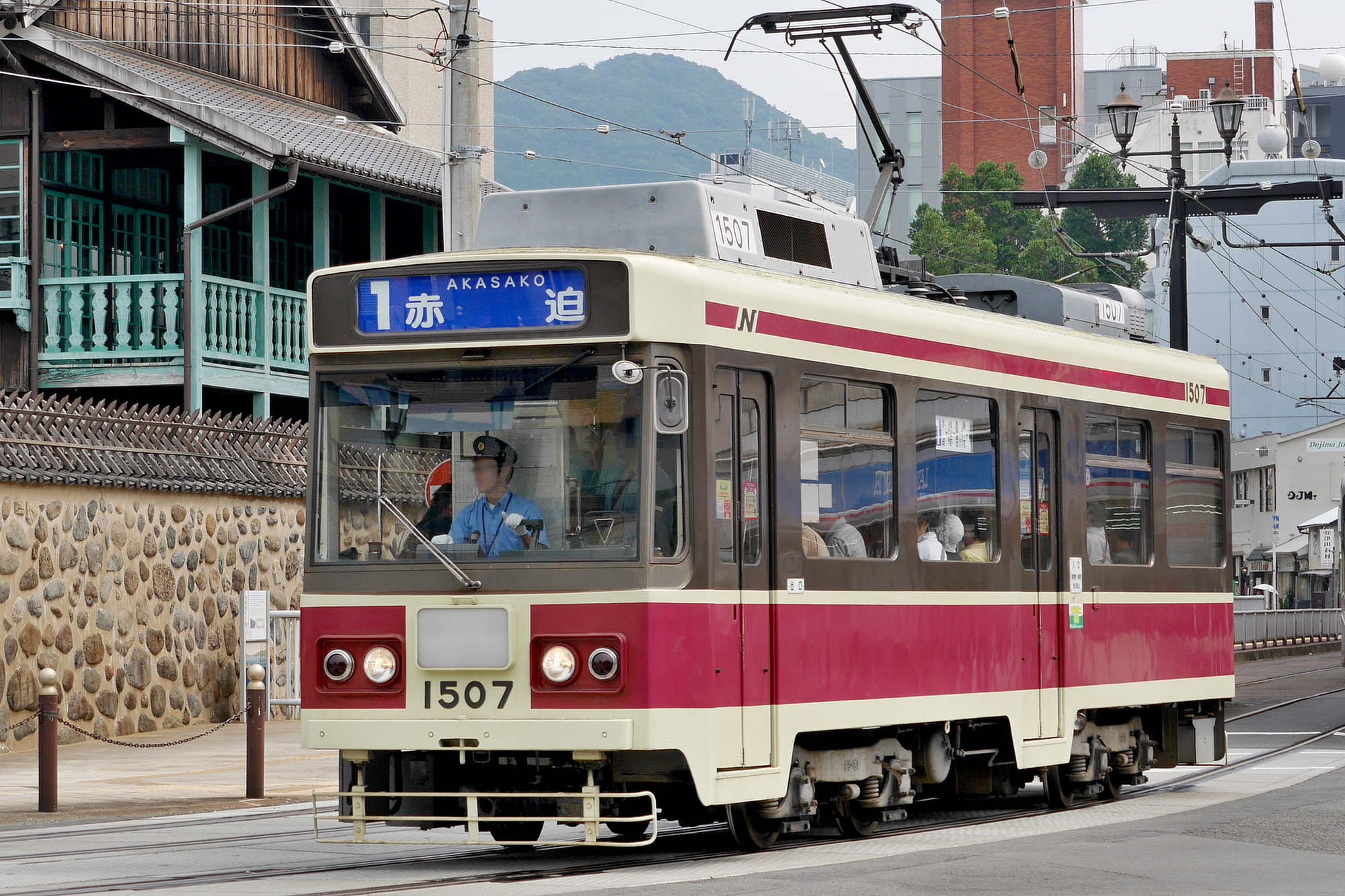 長崎電気軌道の路面電車車両、1500A形1507（築町‐出島にて撮影）。